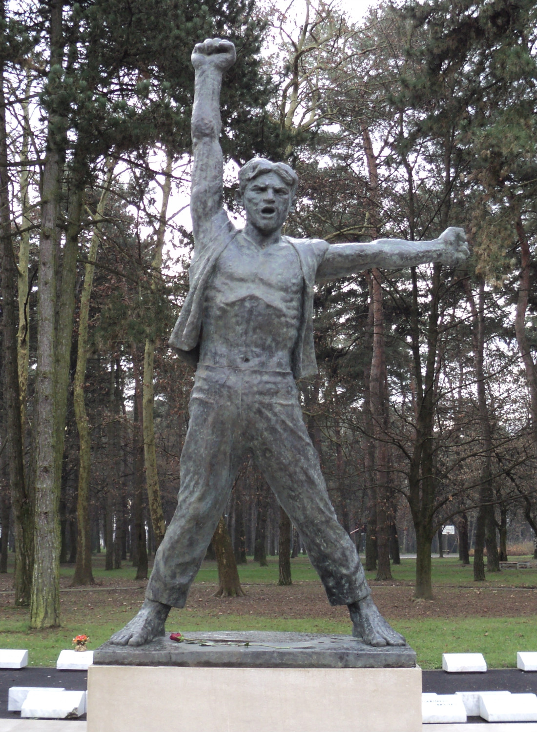 Spomenik vlastitoj braći poginuloj u logorima i žrtvama fašizma u parku Borik u Bjelovaru, rad Vojina Bakića